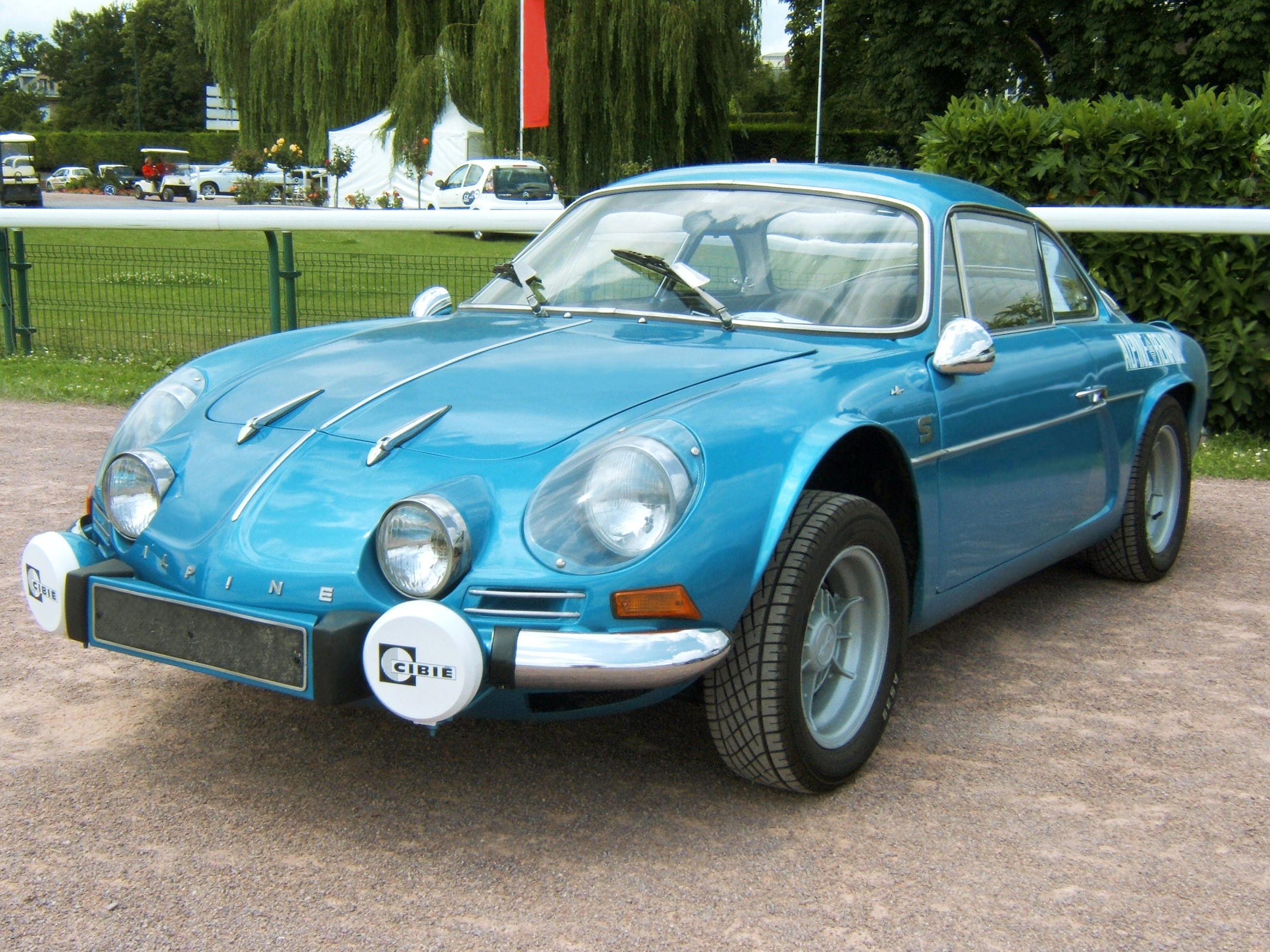 Alpine A110 Berlinette